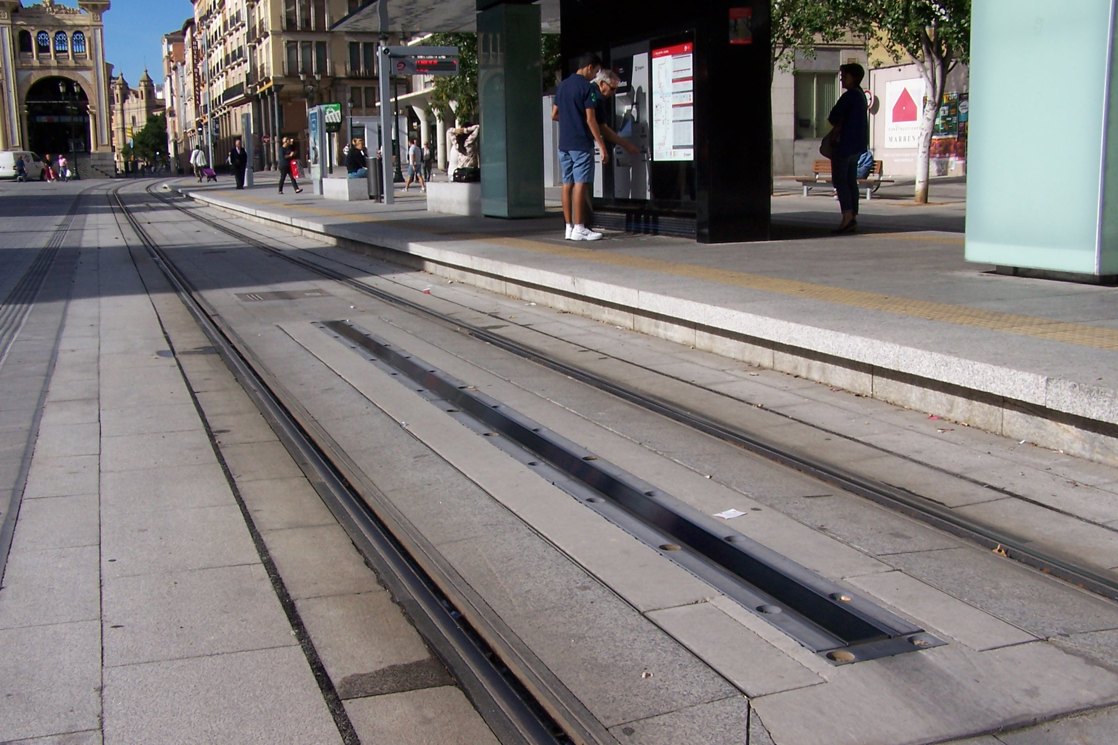 Aufladeschiene der Straßenbahn Saragossa an der Haltestelle Murallas. Die Bahn fährt hier mit Ultracaps (ohne Stromabnehmer) und wird mithilfe dieser Schiene, an den Haltestellen, aufgeladen.